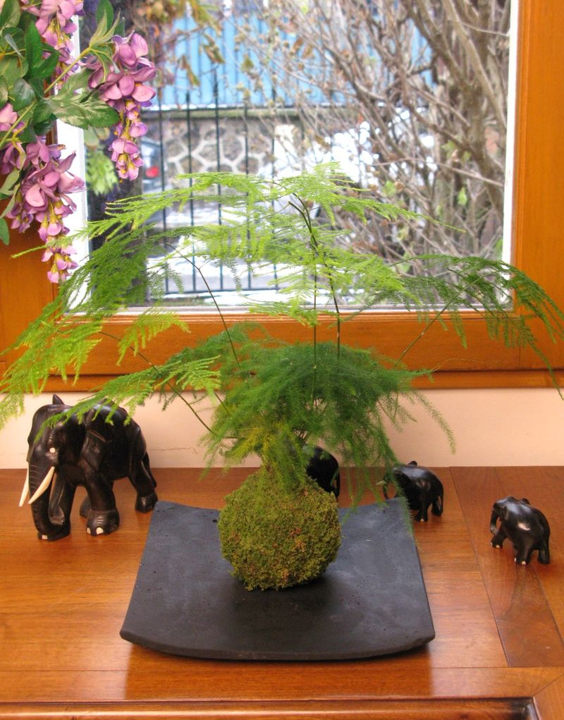 Kokedama d'Asparagus plumosus (Asparagus setaceus).